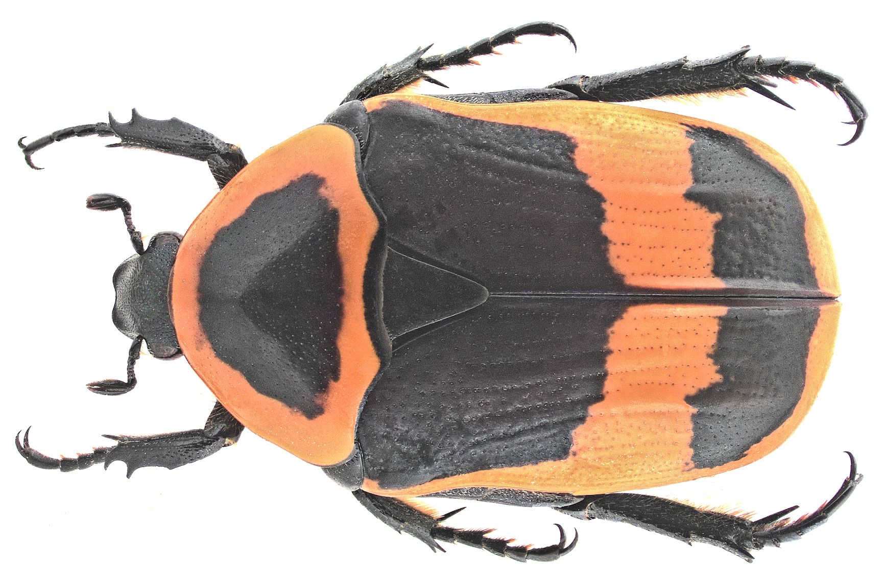 Familie: Scarabaeidae Groesse: 24 mm Verbreitung: Nordafrika Fundort: Aegypten, Luxor leg. B.Mohamed, 1994; det. U.Schmidt Photo: U.Schmidt, 2006